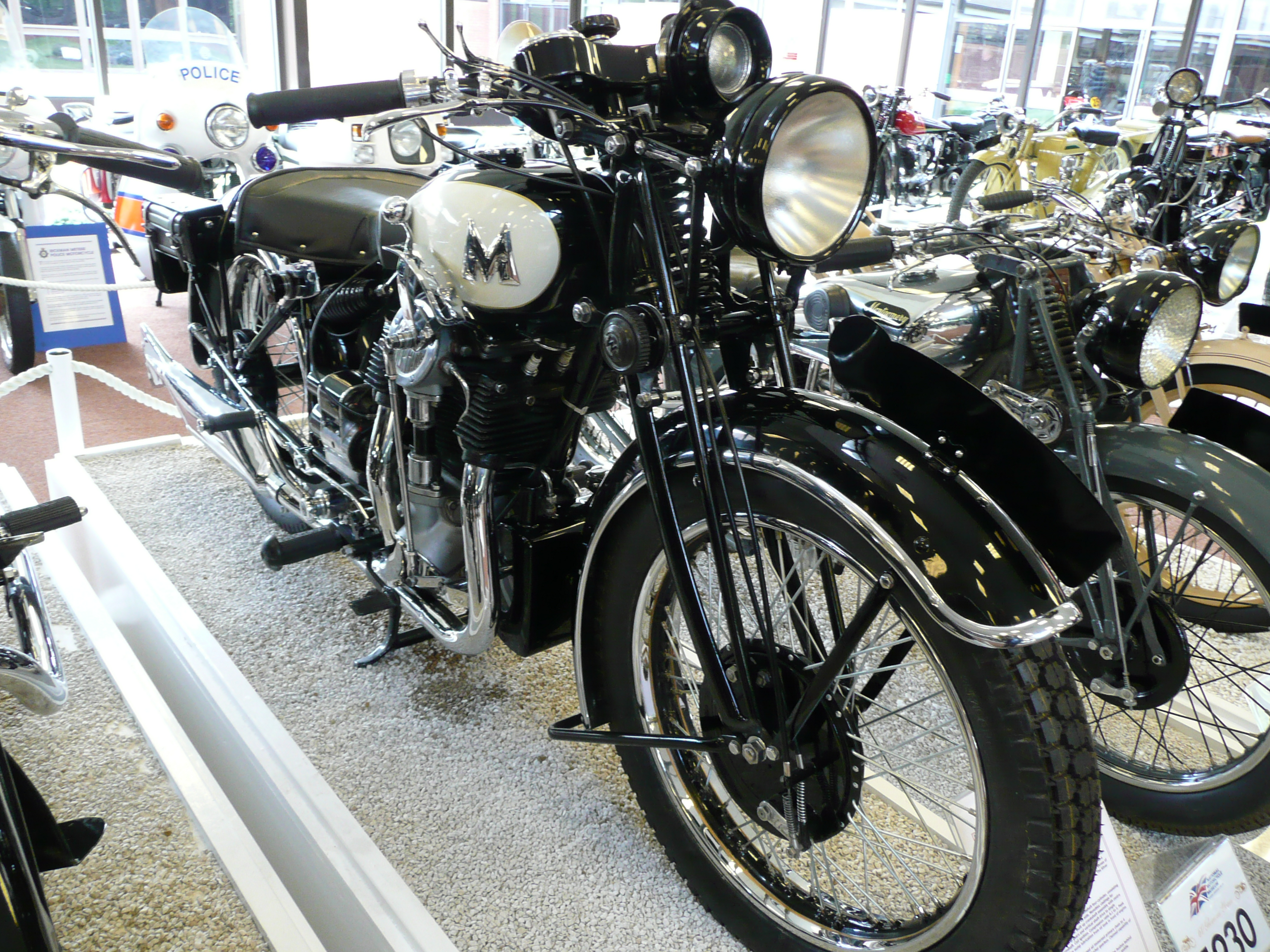 1931 Matchless Silver Hawk